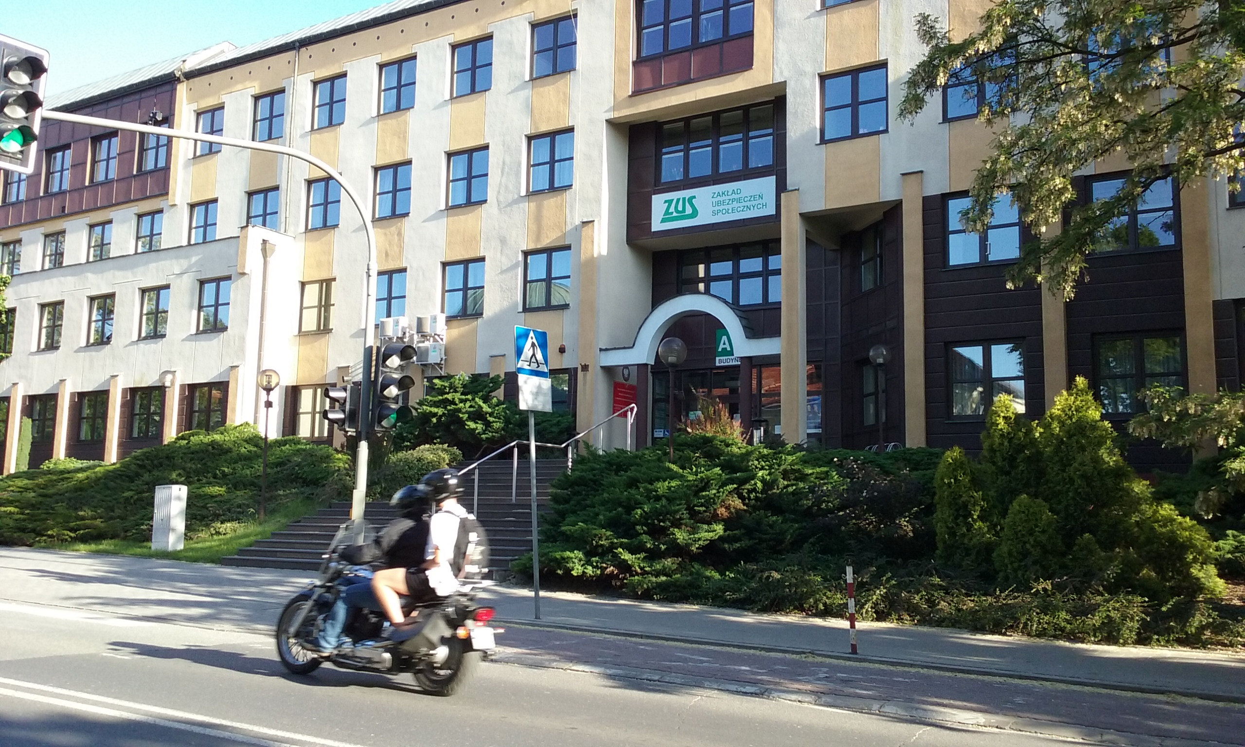 Tomaszów Mazowiecki, ul. Mościckiego 40/42 - Zakład Ubezpieczeń Społecznych